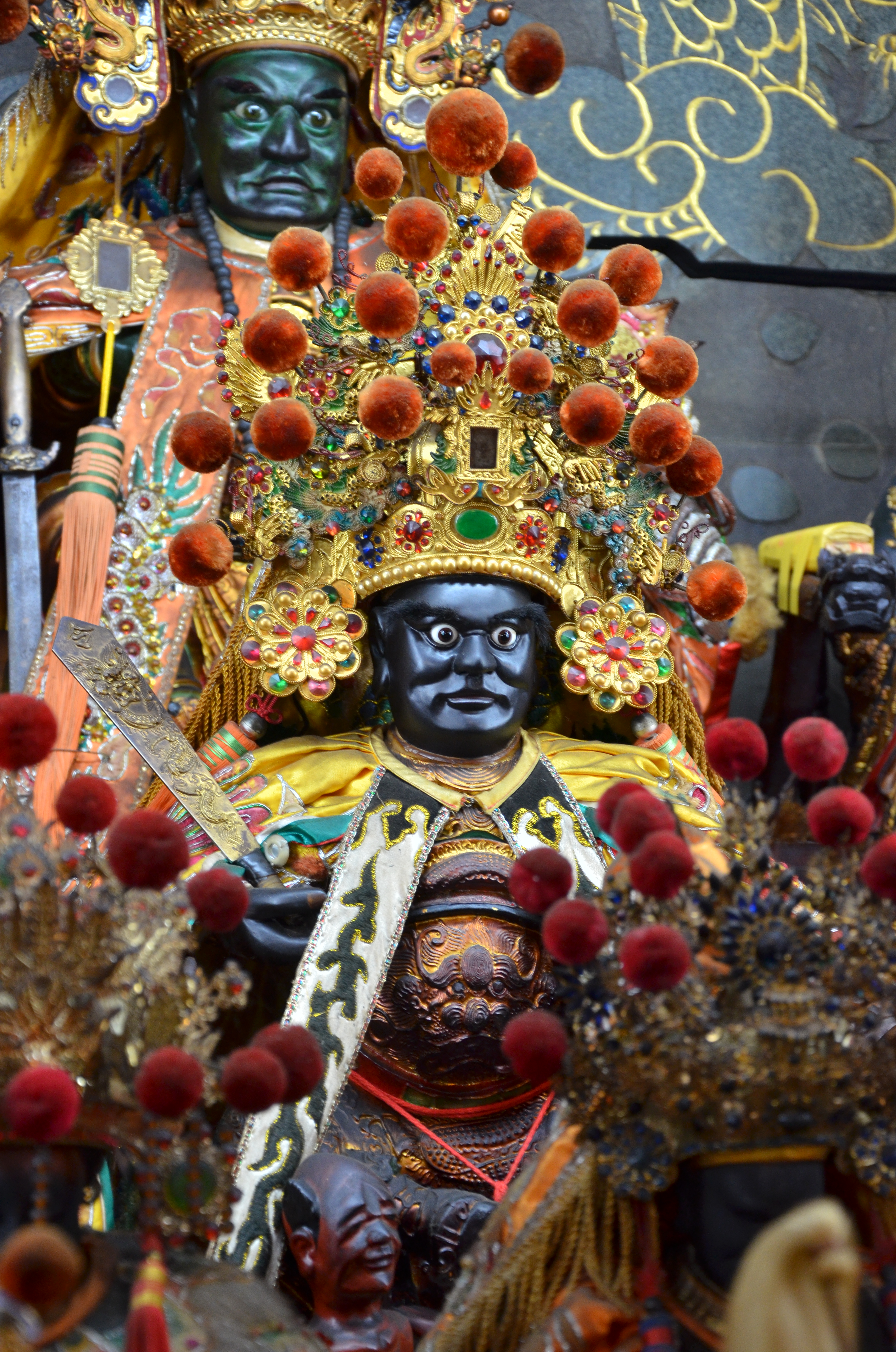 臺南南沙宮三王